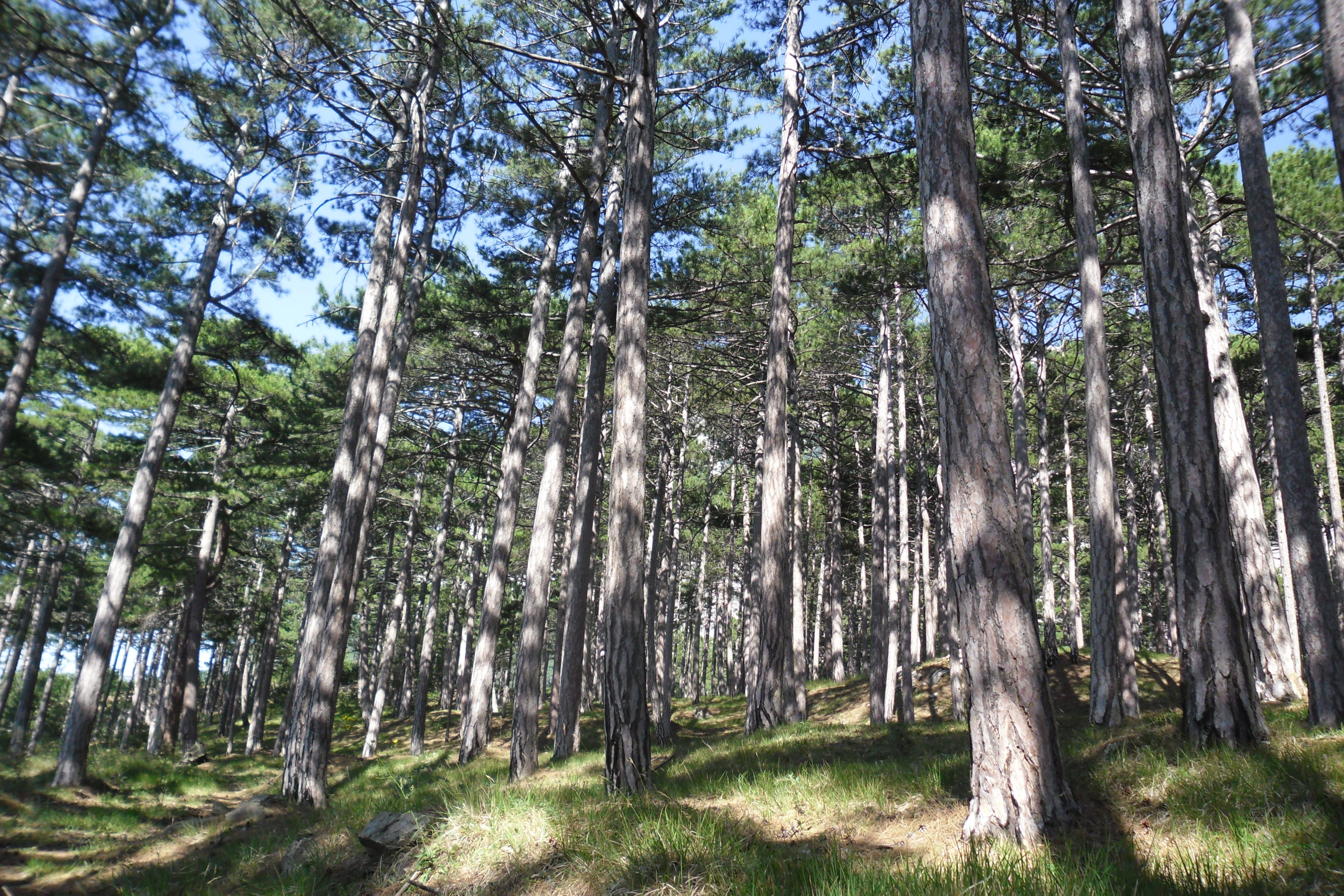 Фото